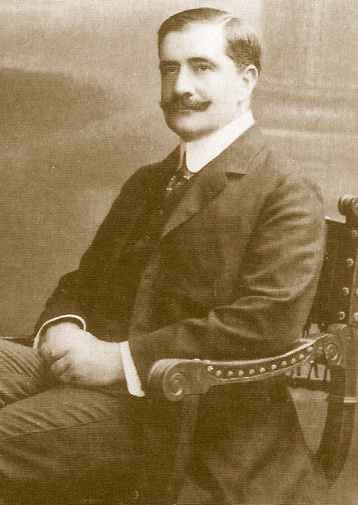 Max Graf von Coudenhove (1865-1928), austrian diplomat